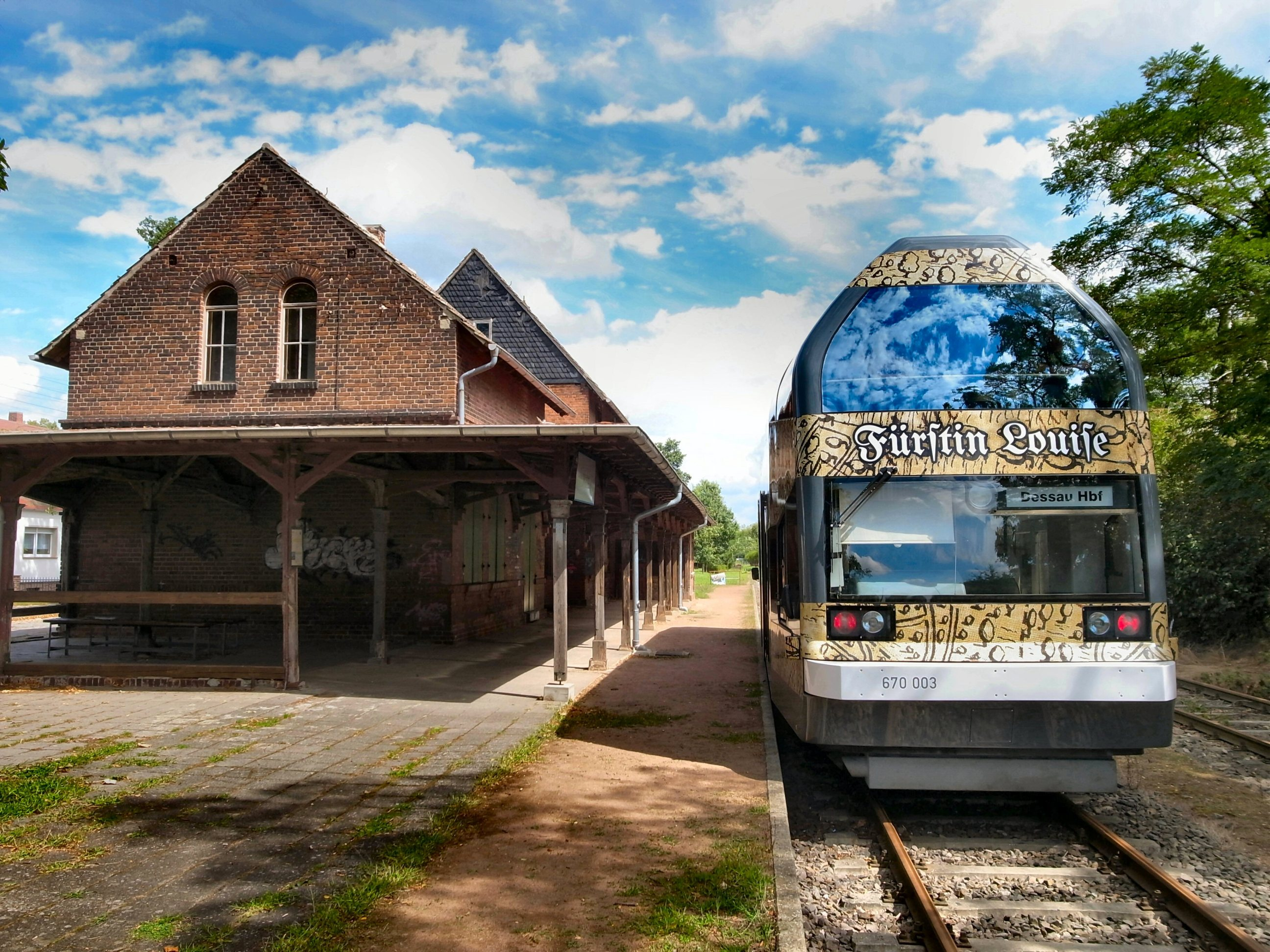 Bahnhof Wörlitz, Doppelstock-Schienenbuss "Louise" der Dessau-Wörlitzer Eisenbahn